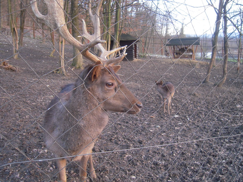 Zoo park Banja Luka